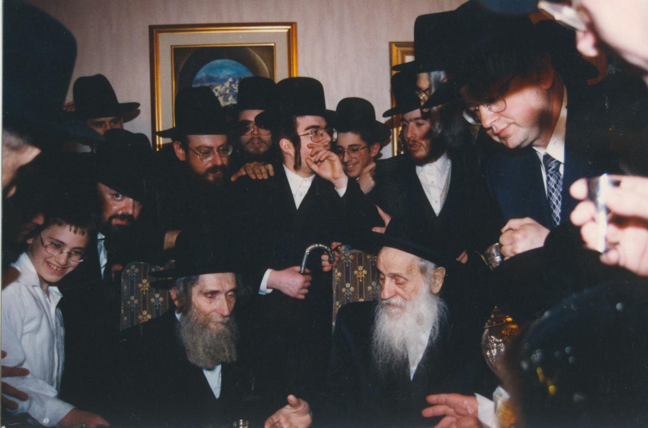 הרבי מסאטמר בביקור באכסניית הרב שטיינמן בביקורו בארצות הברית